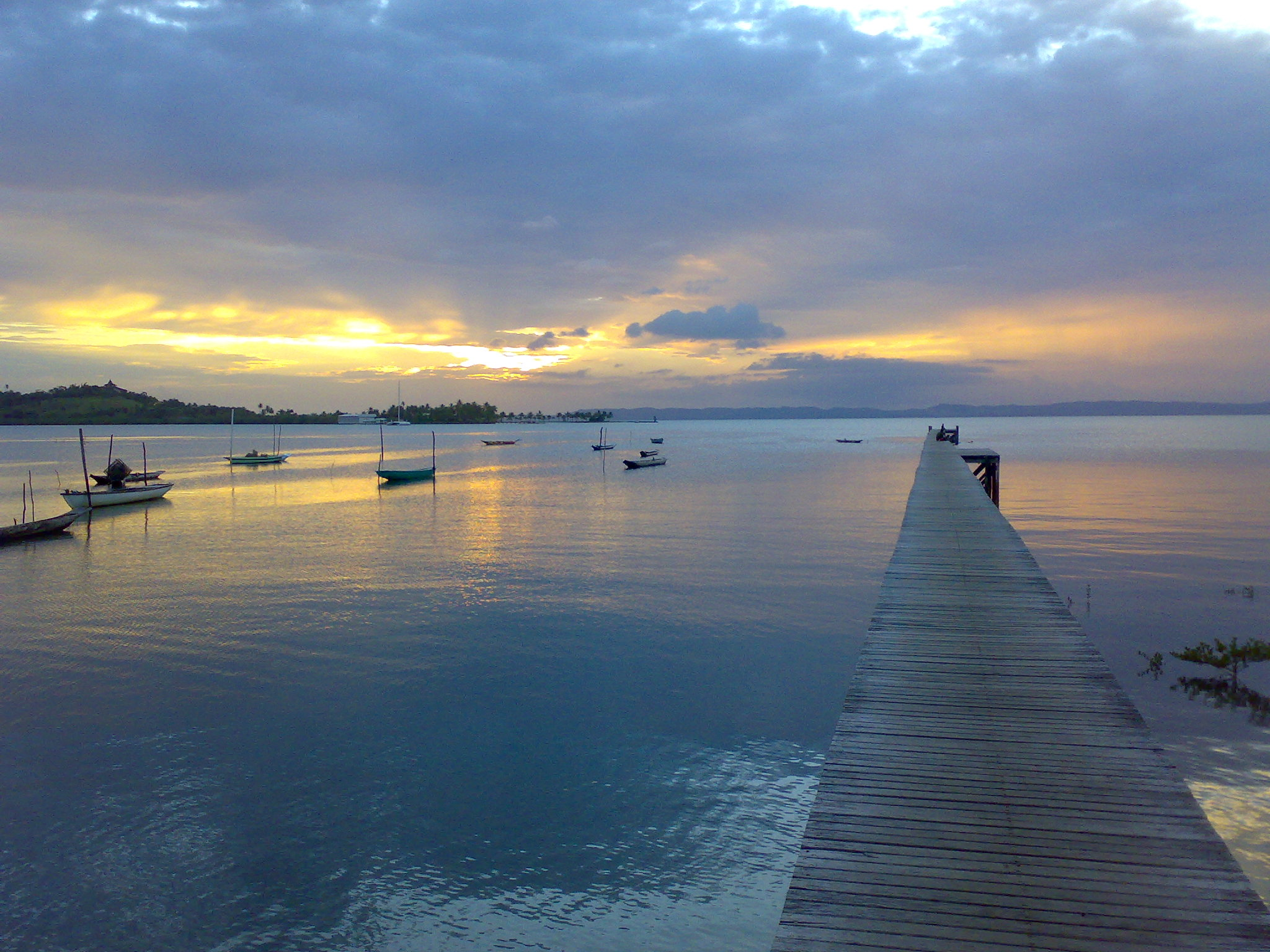 Puesta de sol en un embarcadero en Misericordia, Itaparica (Bahía, Brasil)